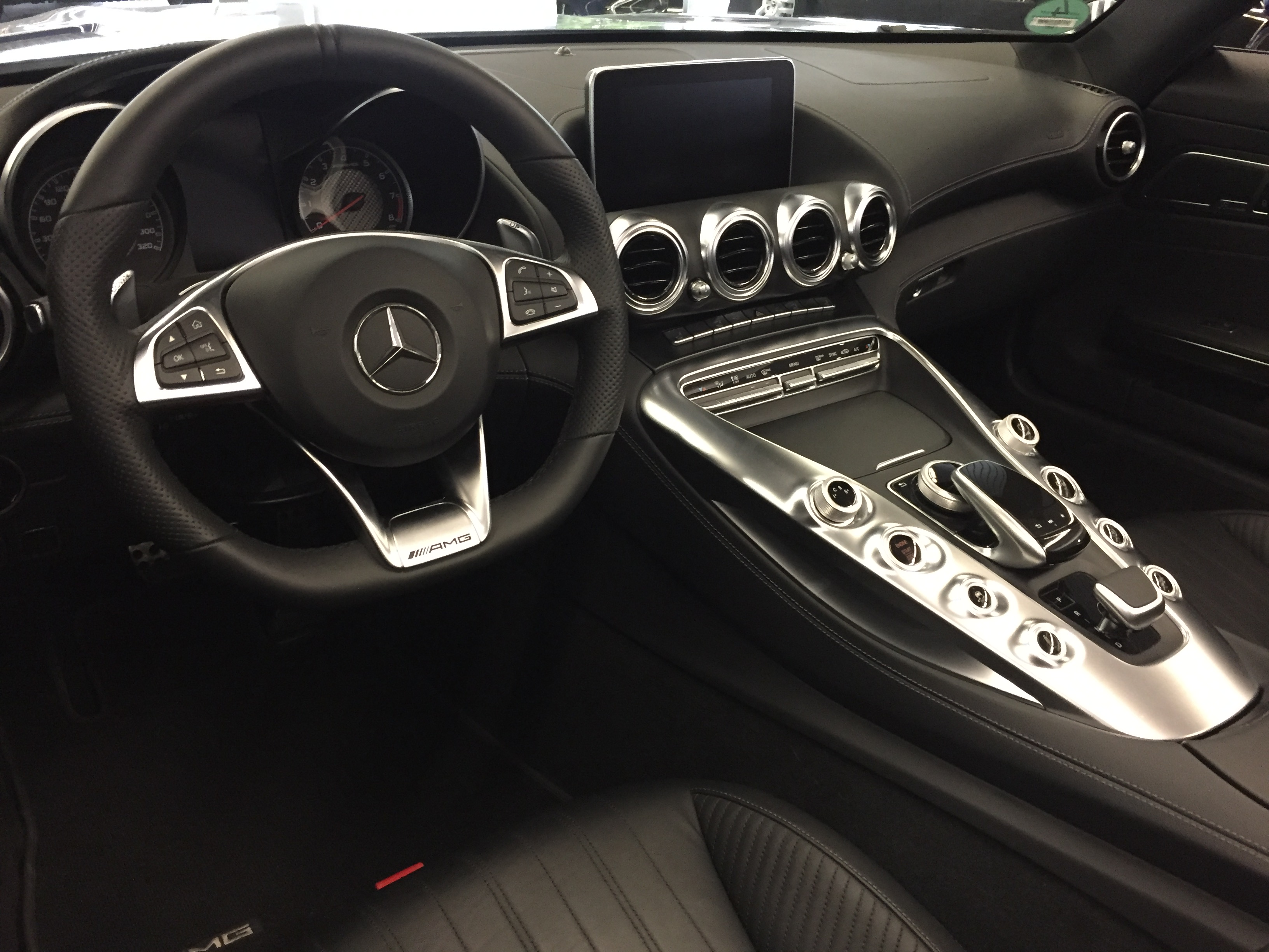 Mercedes AMG GT C Cockpitansicht